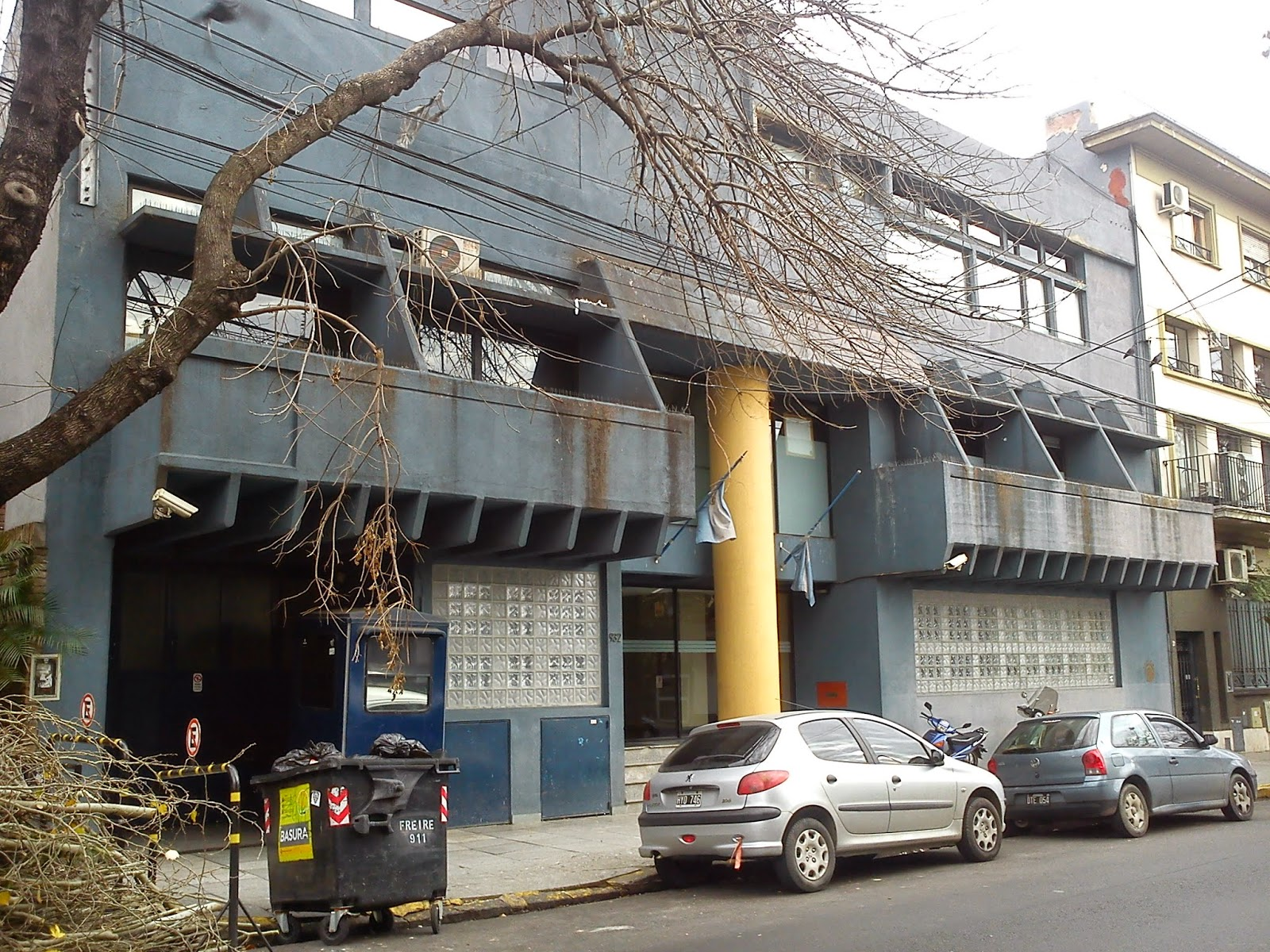 Edificio de Capitán Ramón Freire 932